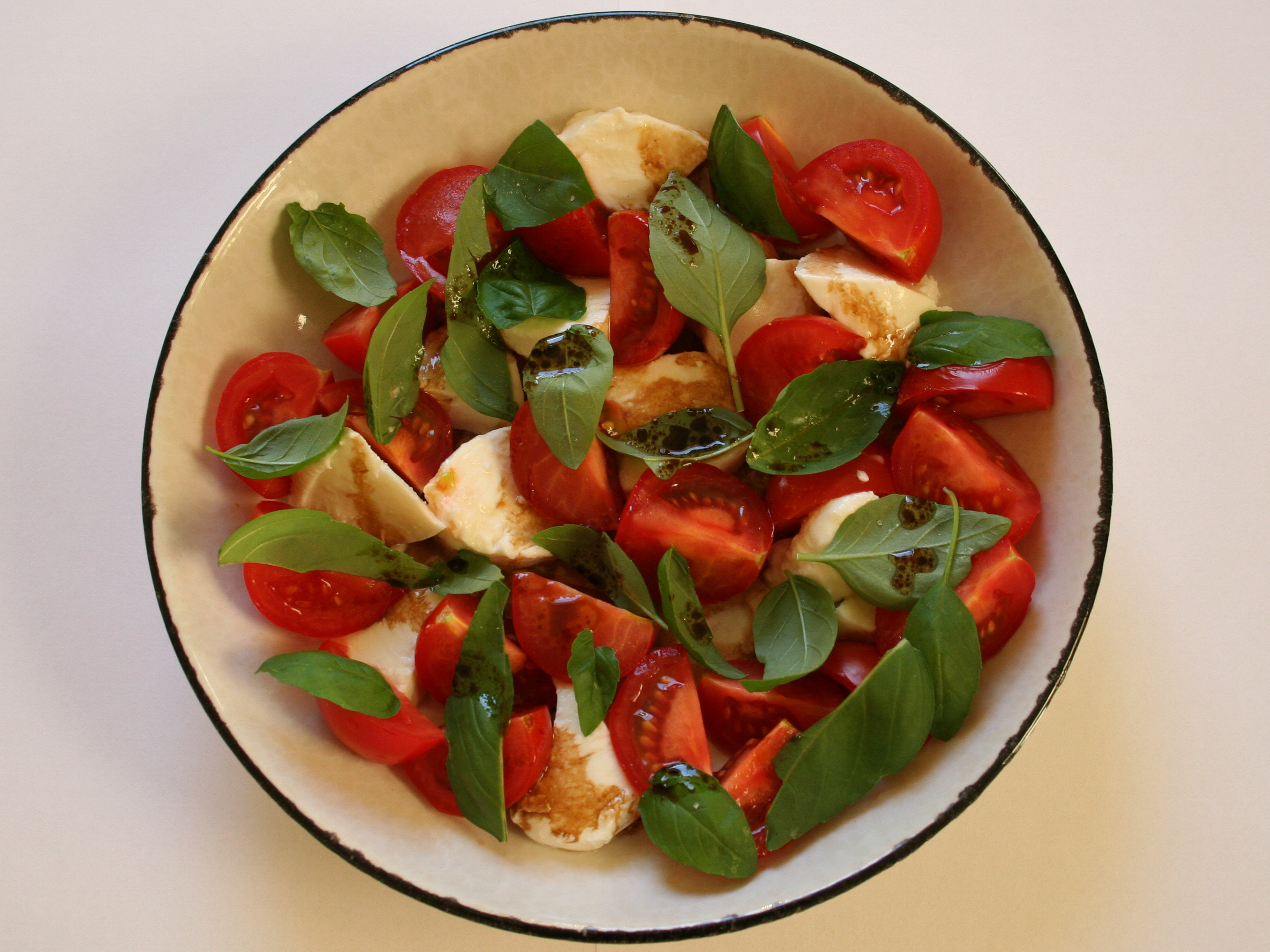 Caprese Salad